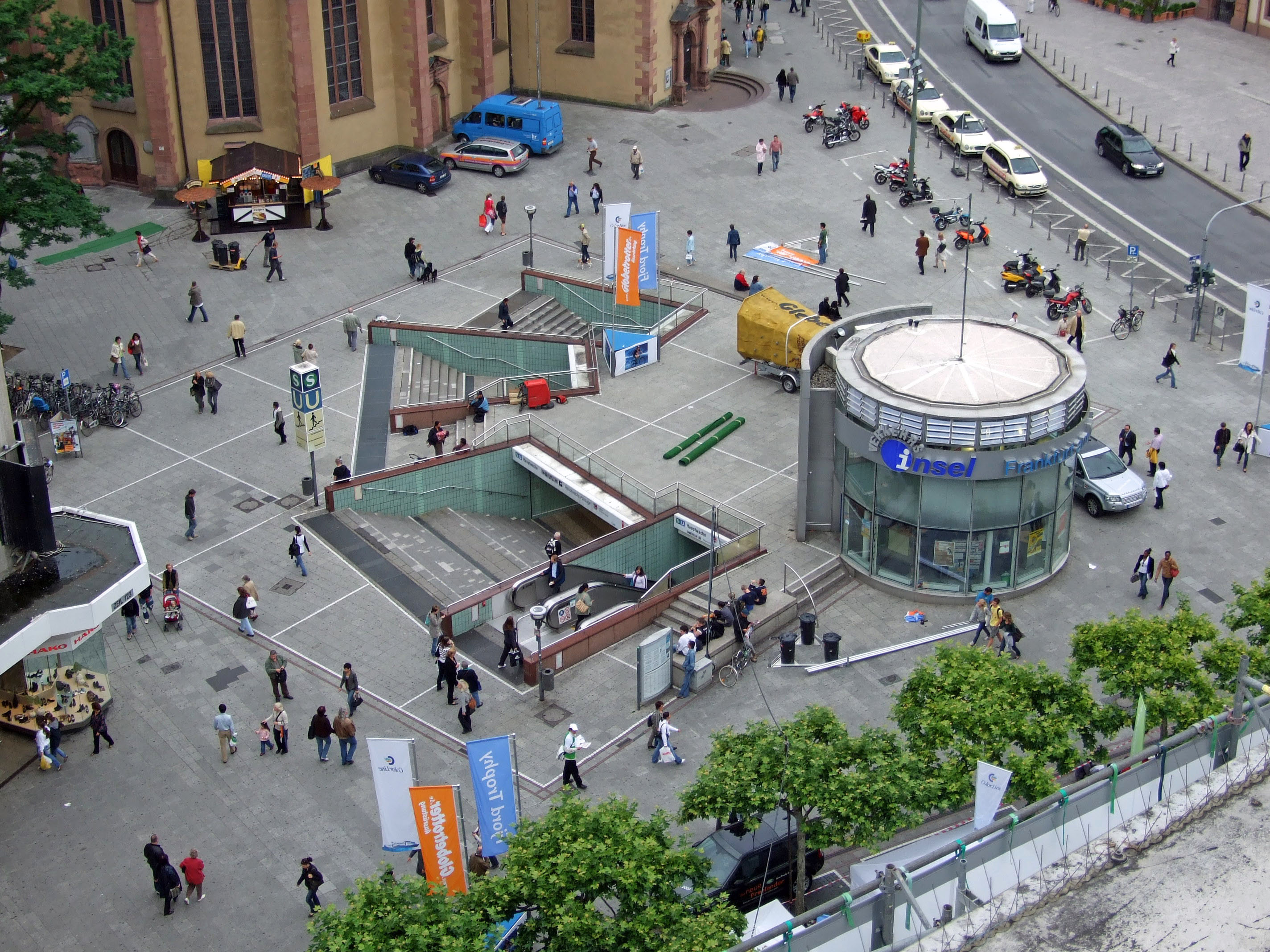 Zugänge zur B-Ebene und zu U- und S-Bahn am Ende der Zeil an der Katharinenkirche